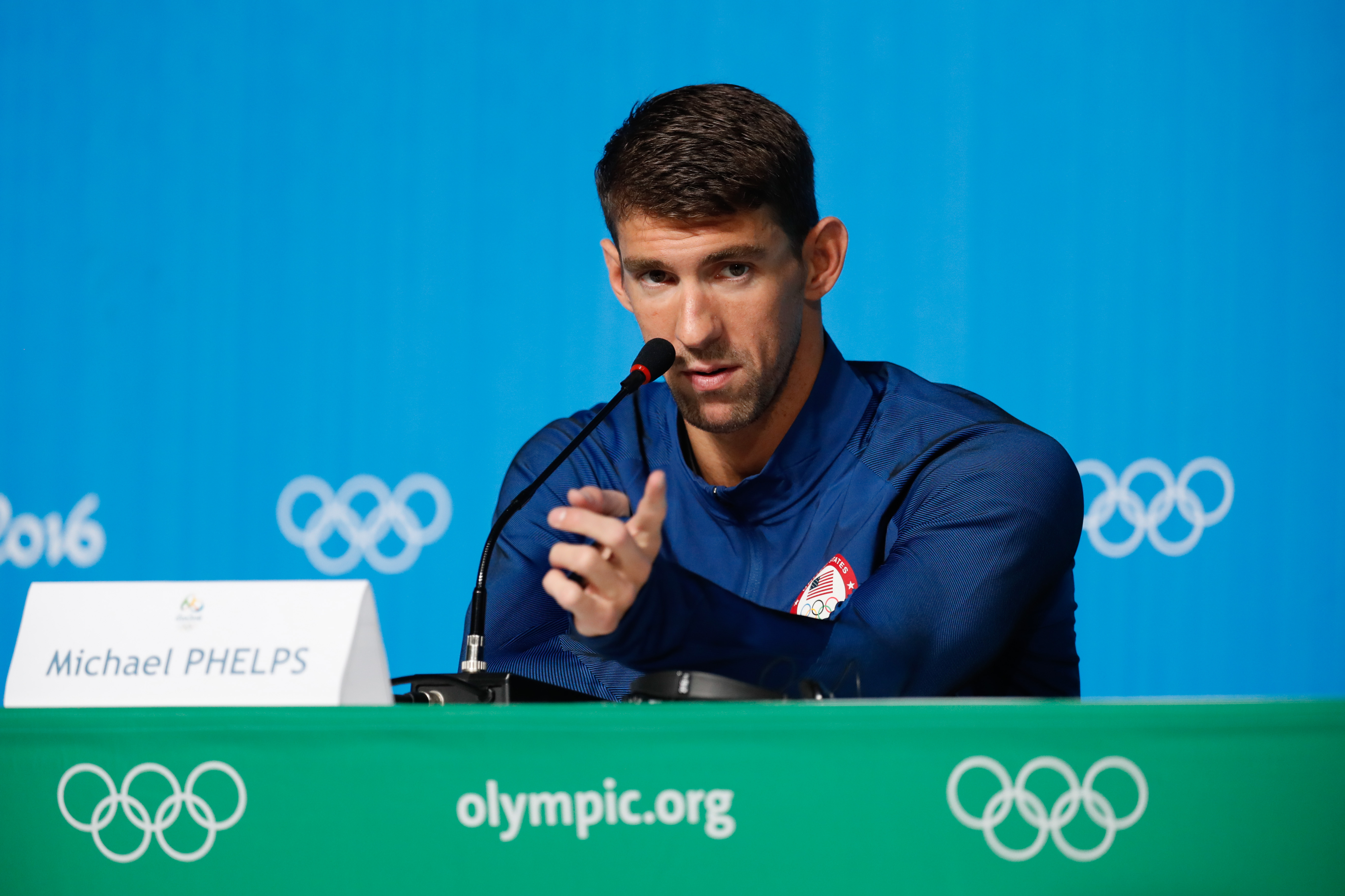 Rio de Janeiro - O nadador Michael Phelps, norte-americano recordista de medalhas olímpicas, 22, concede entrevista no Parque Olímpico dos Jogos Rio 2016 (Fernando Frazão/Agência Brasil)